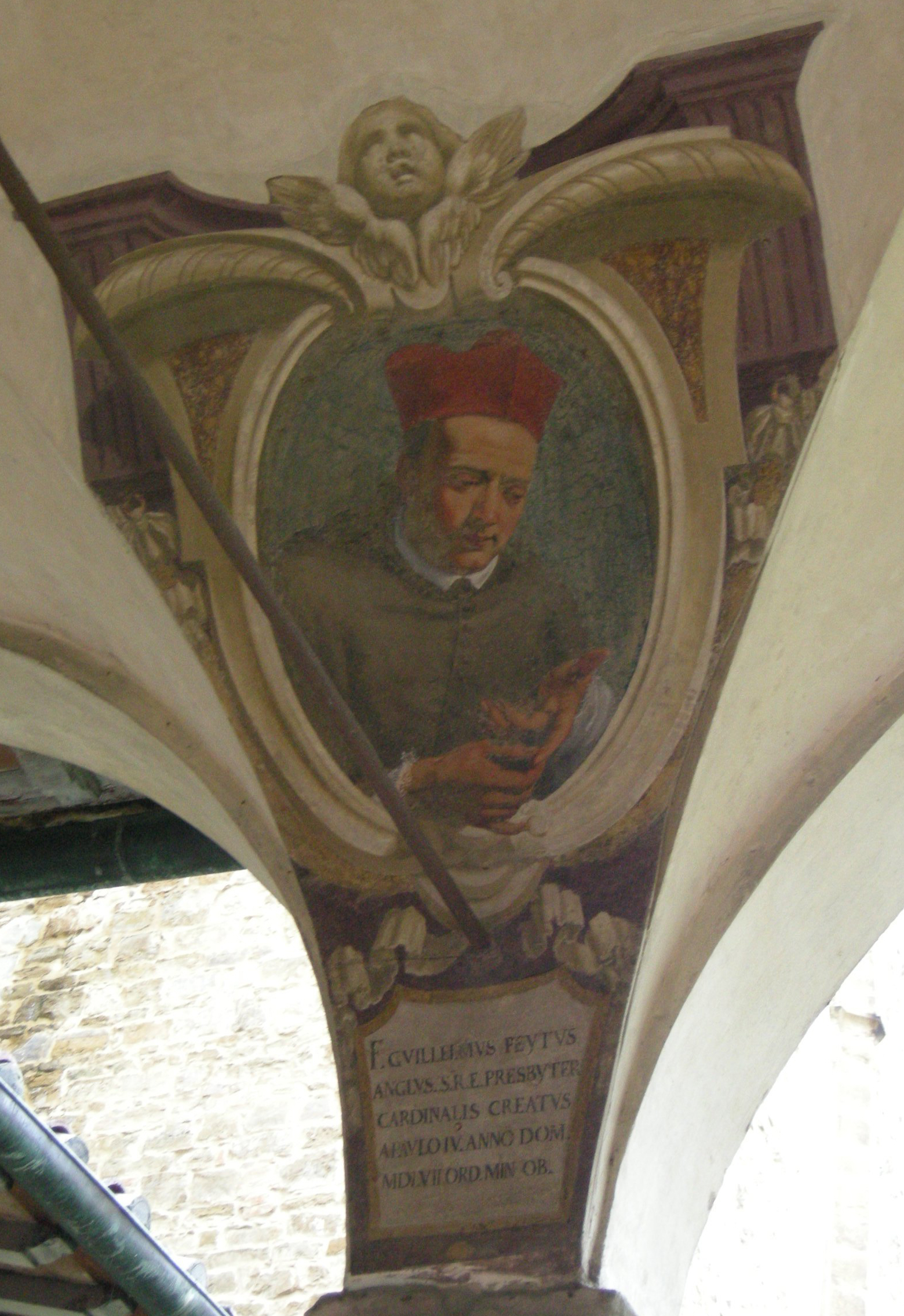 Chiostro di ognissanti, personalità francescane 47 William Peto